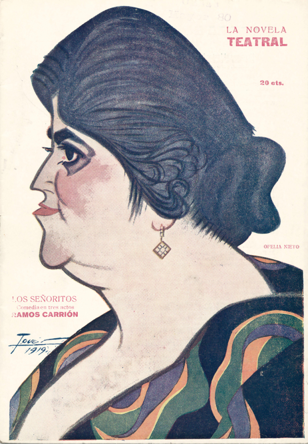 Caricatura de Ofelia Nieto.